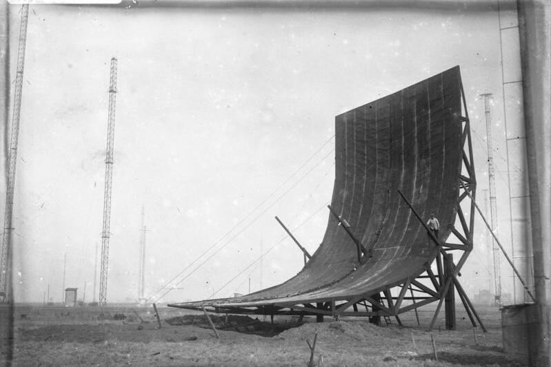 Interessante Versuche auf der Grossfunkenstation in Nauen! Kein Sonnenspiegel, sondern---? ein riesiges Hohlgestell mit Kupfer ausgeschlagen für Versuche, den Radiowellen eine bestimmte Richtung zu geben, um das Empfangen von wichtigen Nachrichten durch fremde Empfangsstationen unmöglich zu machen.